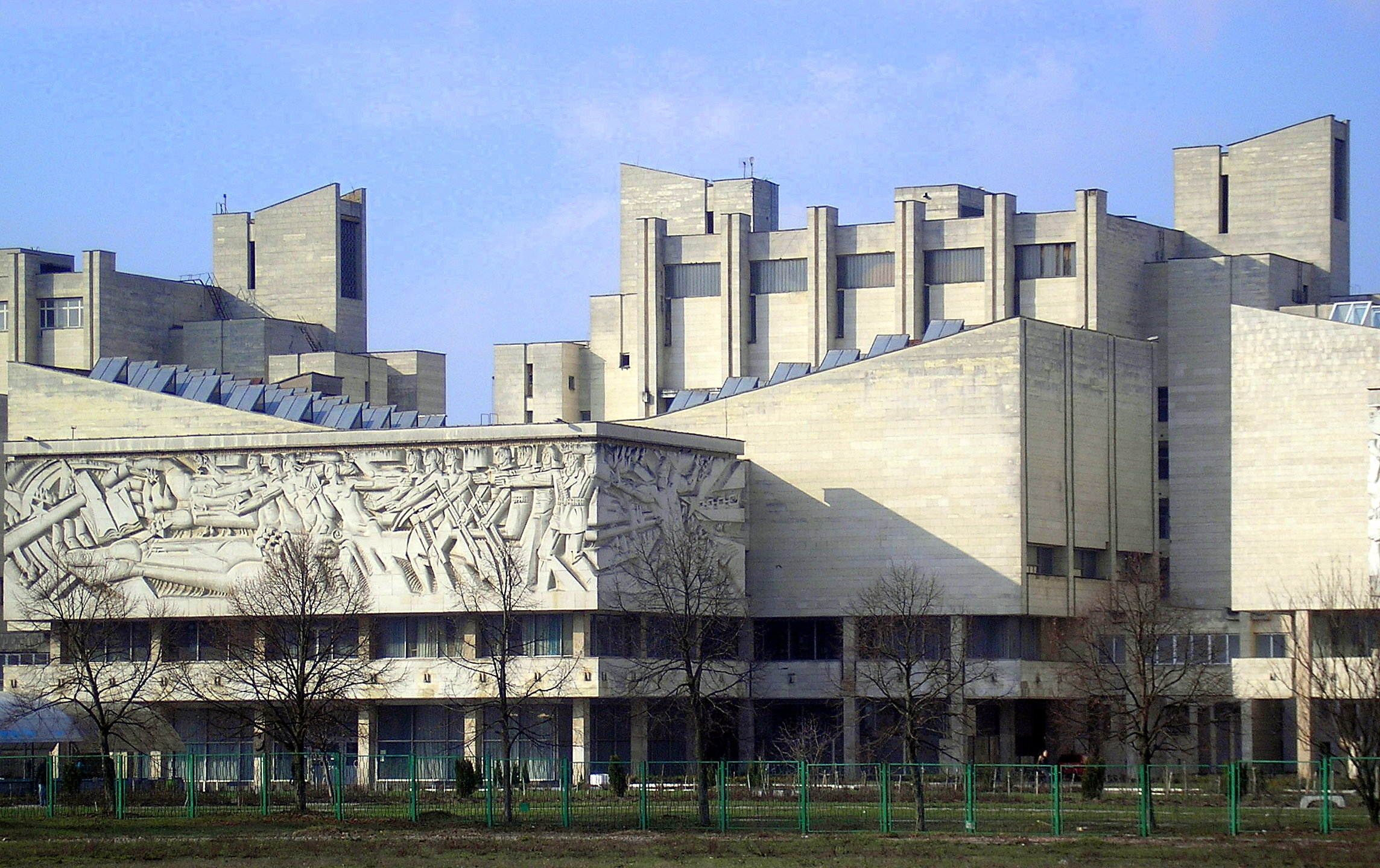 Факультет кібернетики КНУ ім. Тараса Шевченка